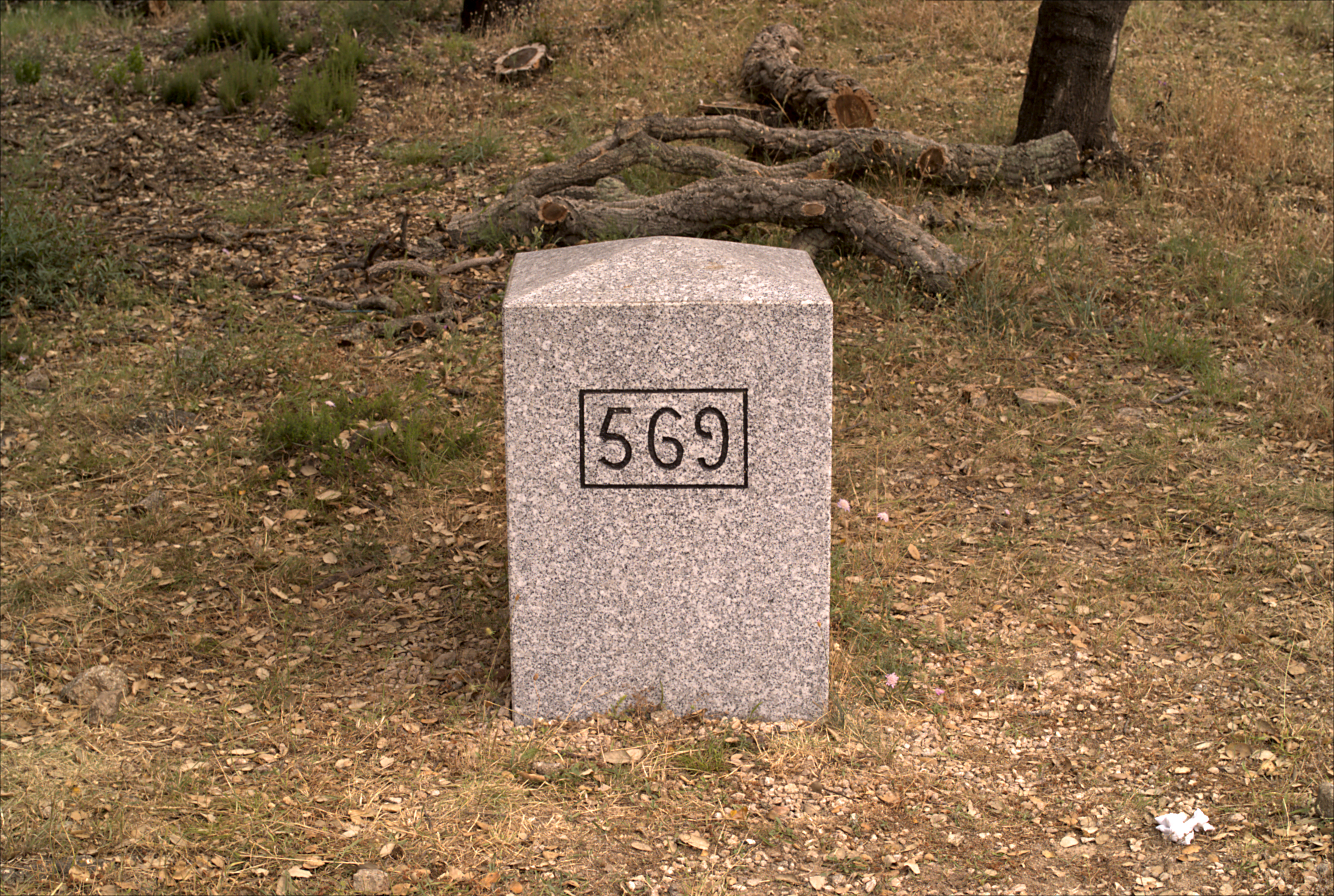 Borne frontière n° 569, Coll de Panissars, Le Perthus (Pyrénées-Orientales, Languedoc-Roussillon, France)